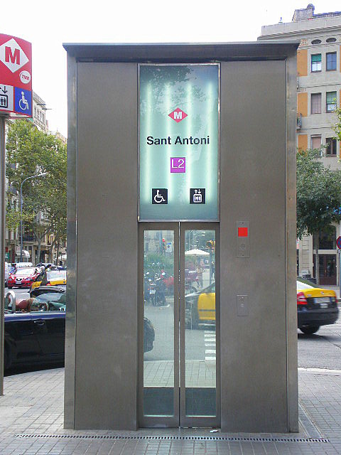 Ascensor de la línia 2 del metro de Barcelona a la parada de Sant Antoni